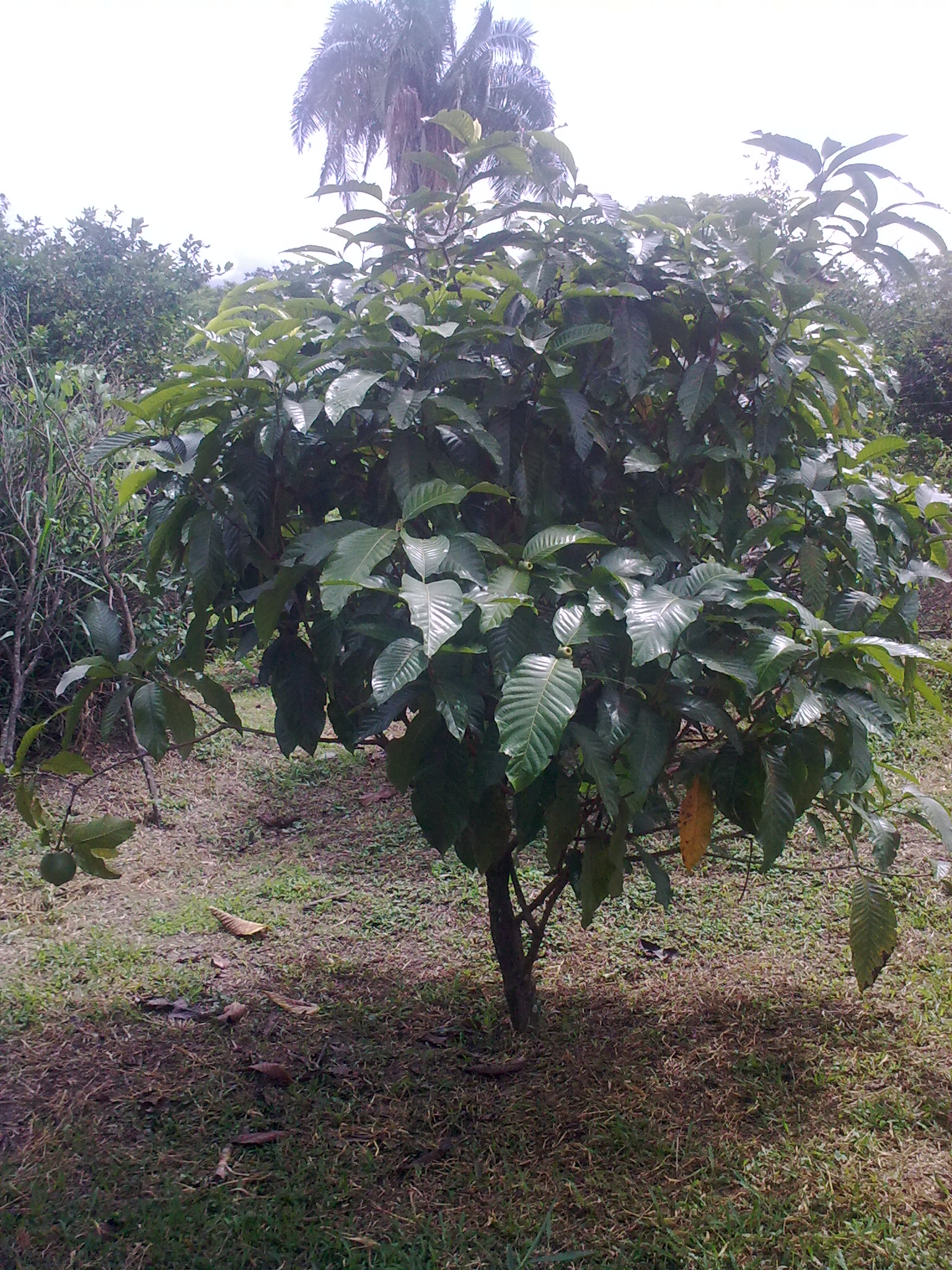 Arbol de Borojó, de aproximadamente 2.5 metros de altura y 5 años de edad. Ubicado en Viotá, Cundinamarca, Colombia. 28ºC de temperatura.